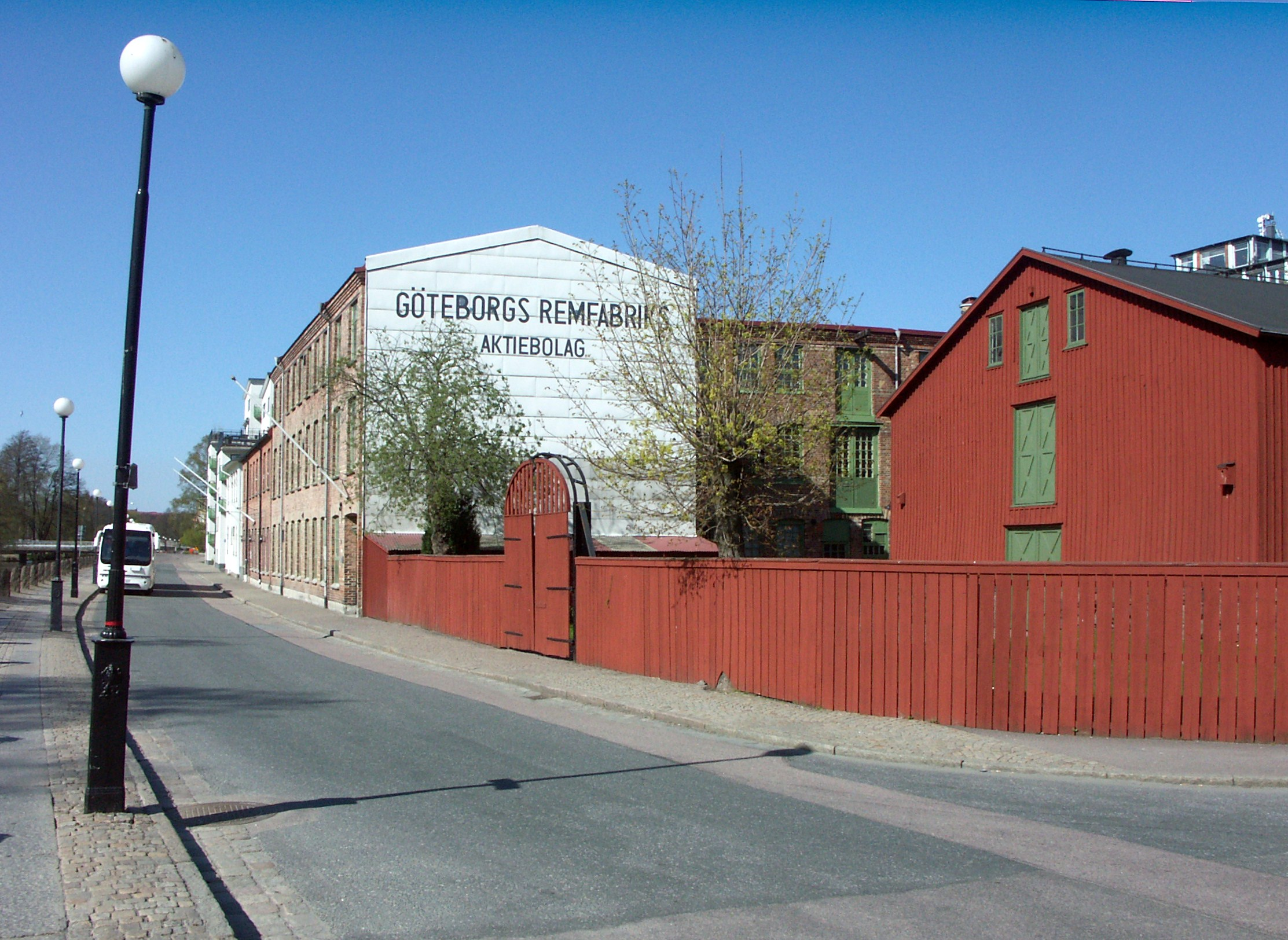 Göteborgs remfabrik (numera ett arbetslivsmuseum) är beläget i stadsdelen Gårda i centrala Göteborg. Även den falurödmålade magasinsbyggnaden i trä i förgrunden är byggnadsminne.